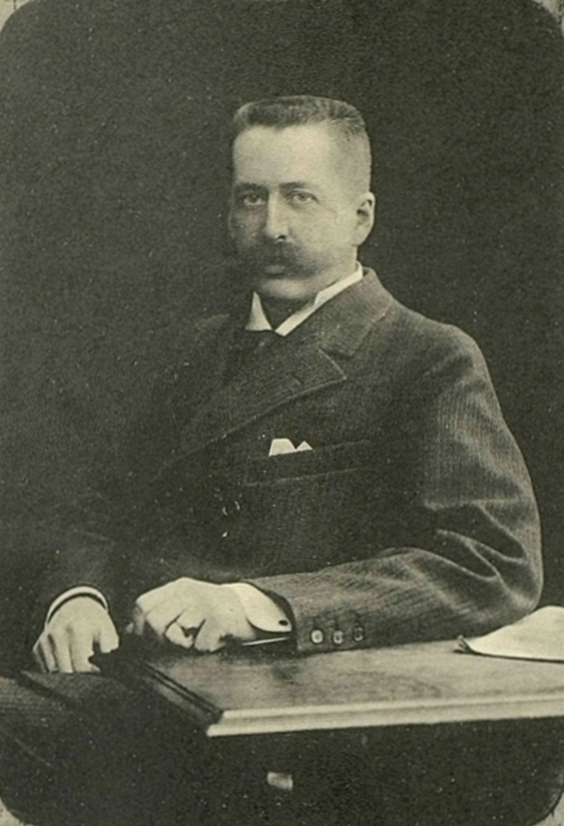 Князь Владимир Михайлович Волконский, член Государственной думы от Тамбовской губернии, товарищ председателя Думы.